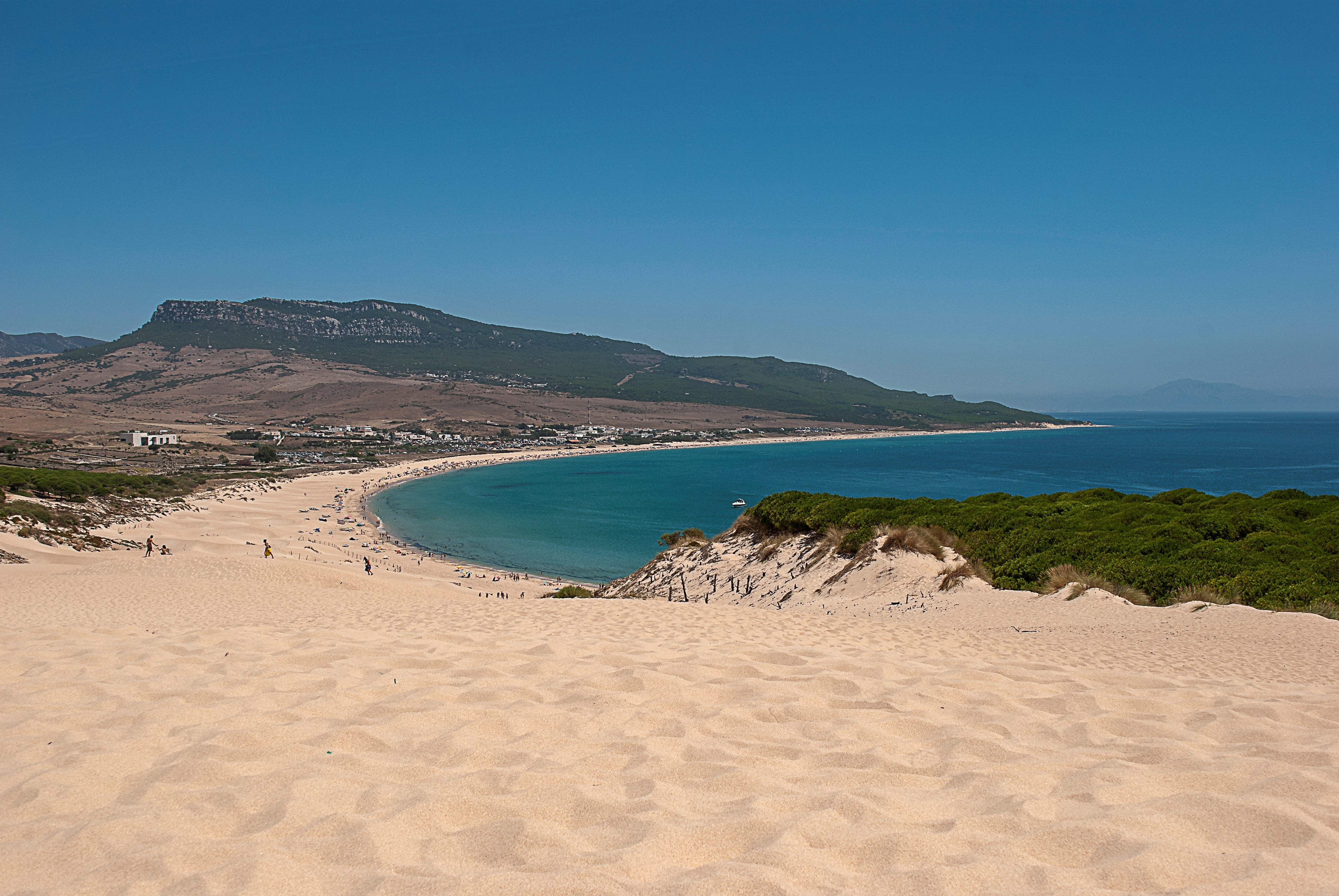 Ensenada y playa de Bolonia. Provincia de Cádiz